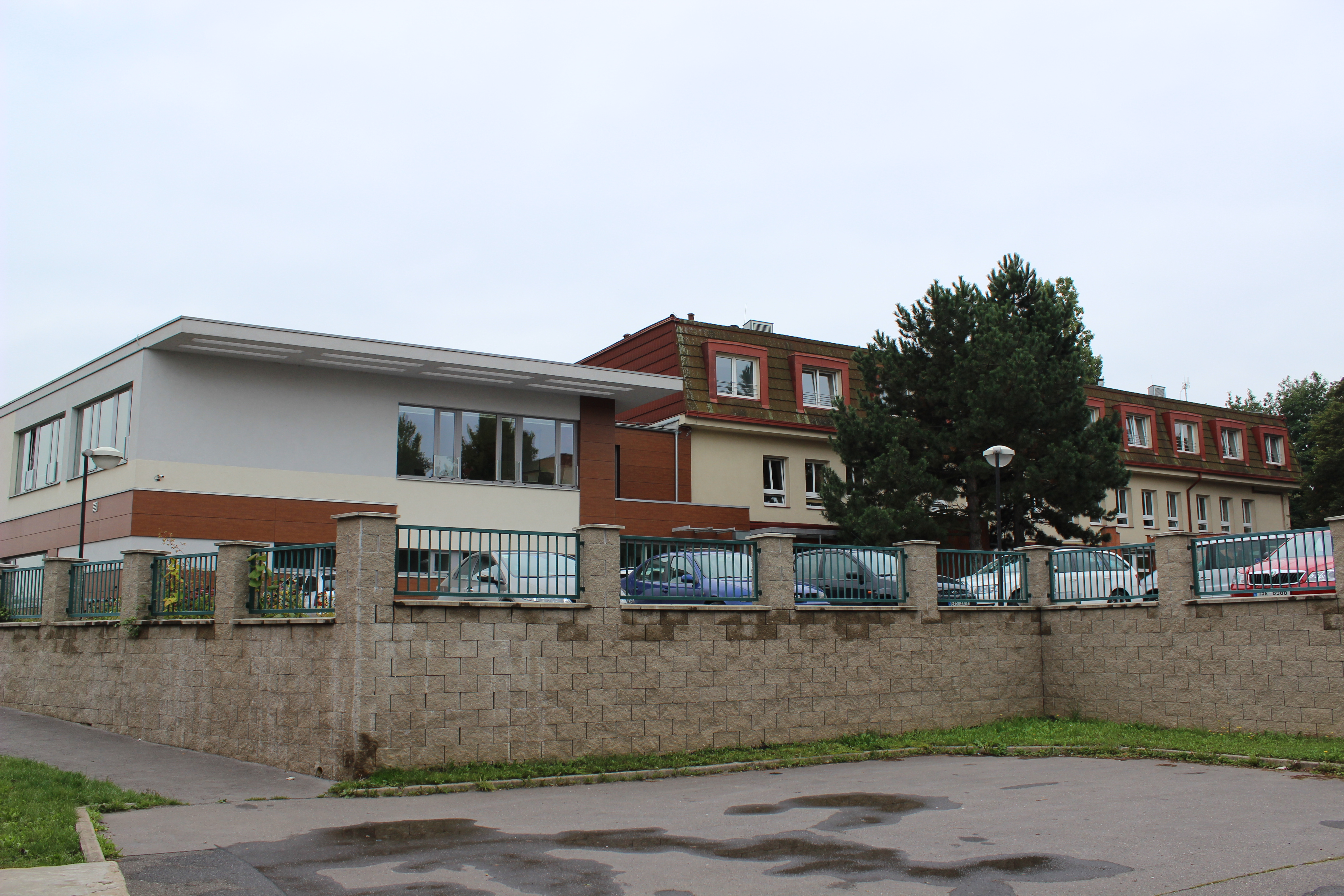 Pražské sídlo Centra Paraple v Ovčárské ulici (pohled od severu).